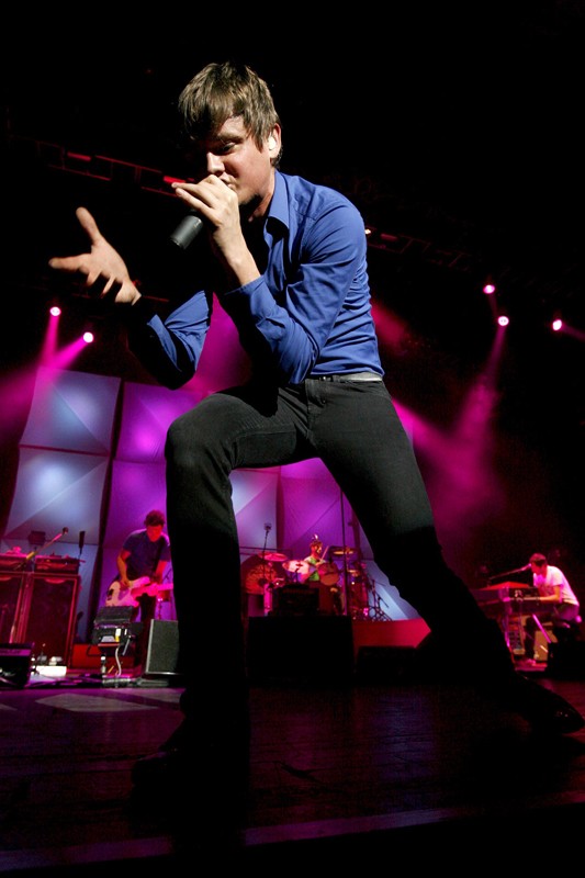 Tom Chaplin, dos Keane, no concerto no Coliseu de Lisboa, 12 Novembro 2008